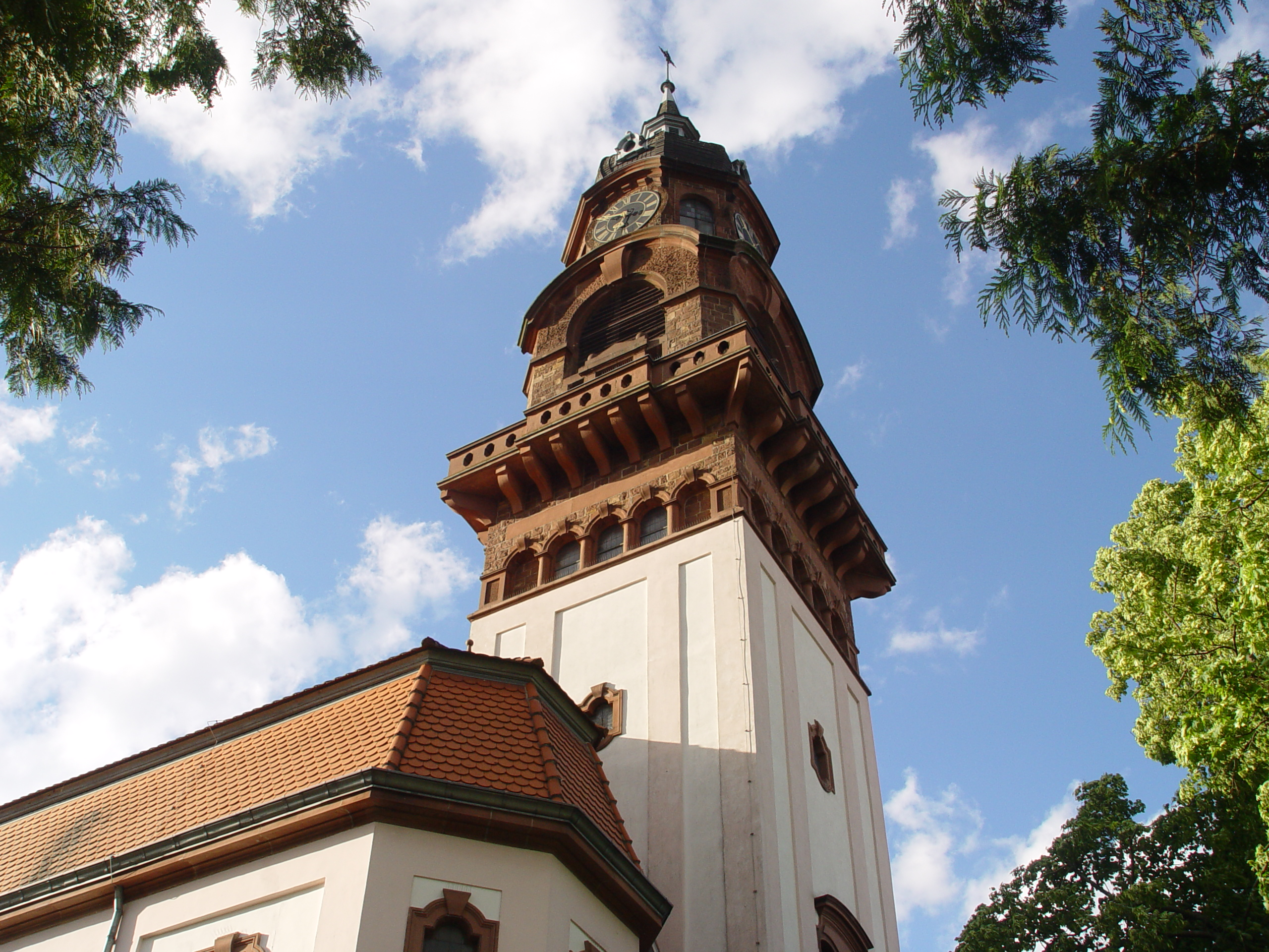 Evangelische Auferstehungskirche Karlsruhe-Rüppur, Seitenansicht